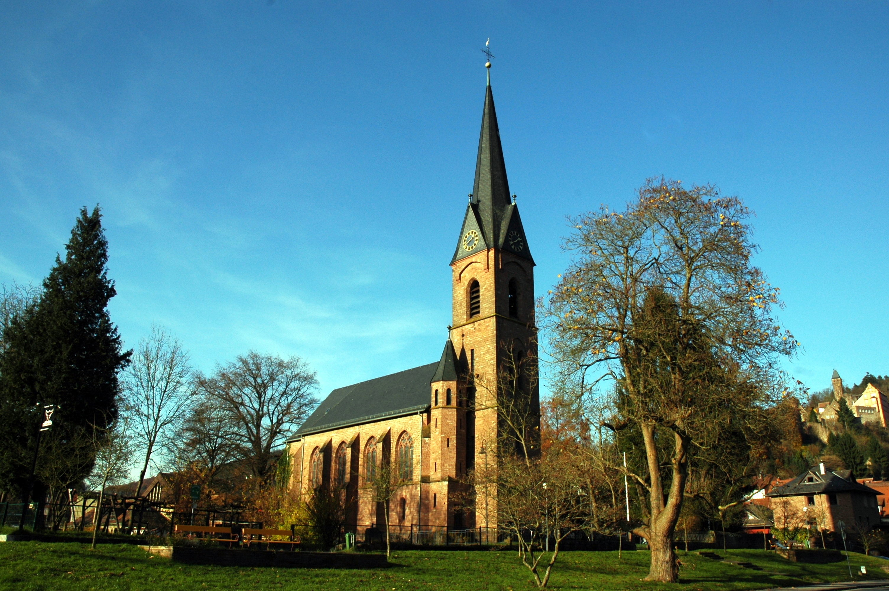 Evangelische Kirche in Hirschorn (Neckar)